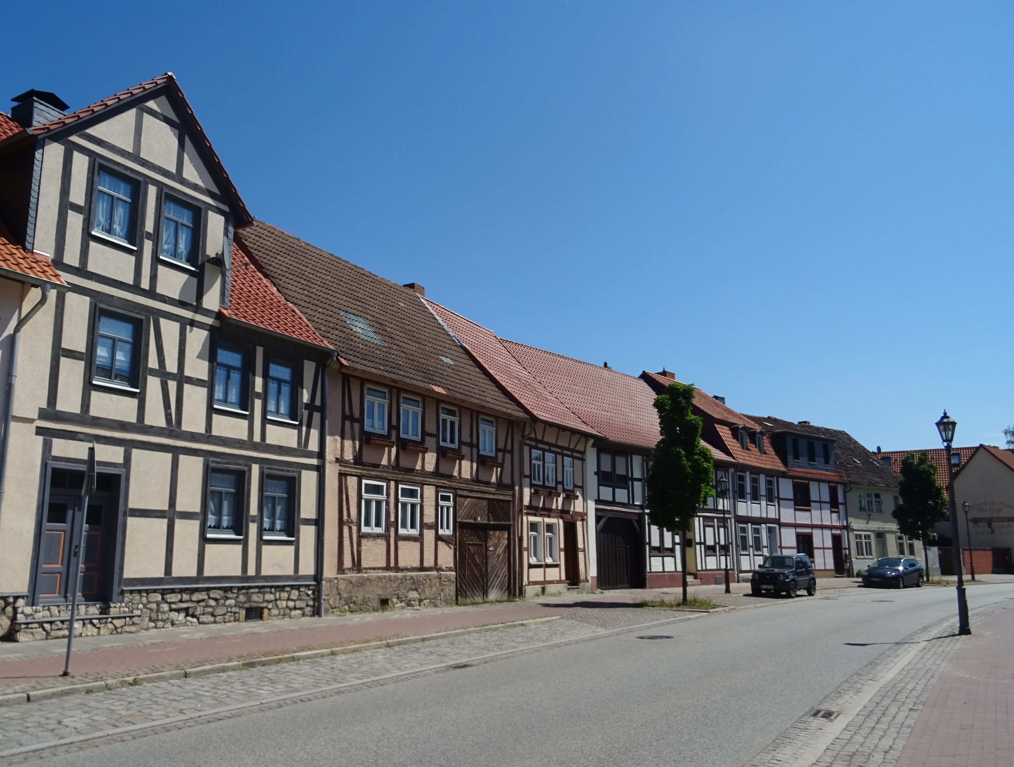 Oschersleben, denkmalgeschützter Straßenzug Nickelkolk